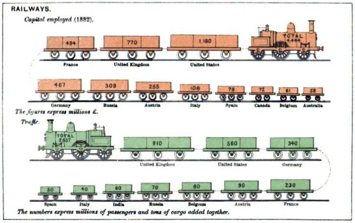 piktograma, trenbideei buruz